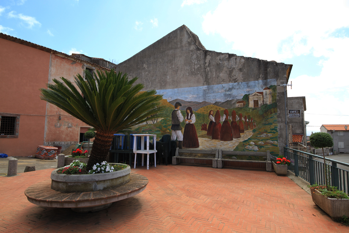 Romantic Murale